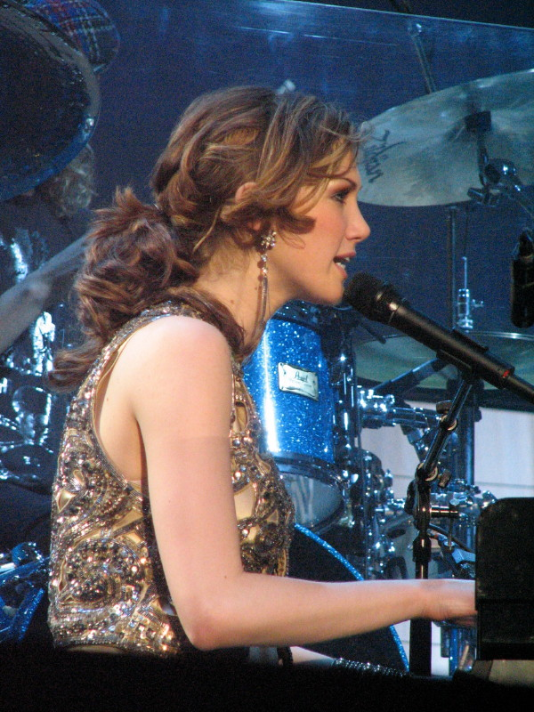 Delta0093.jpg